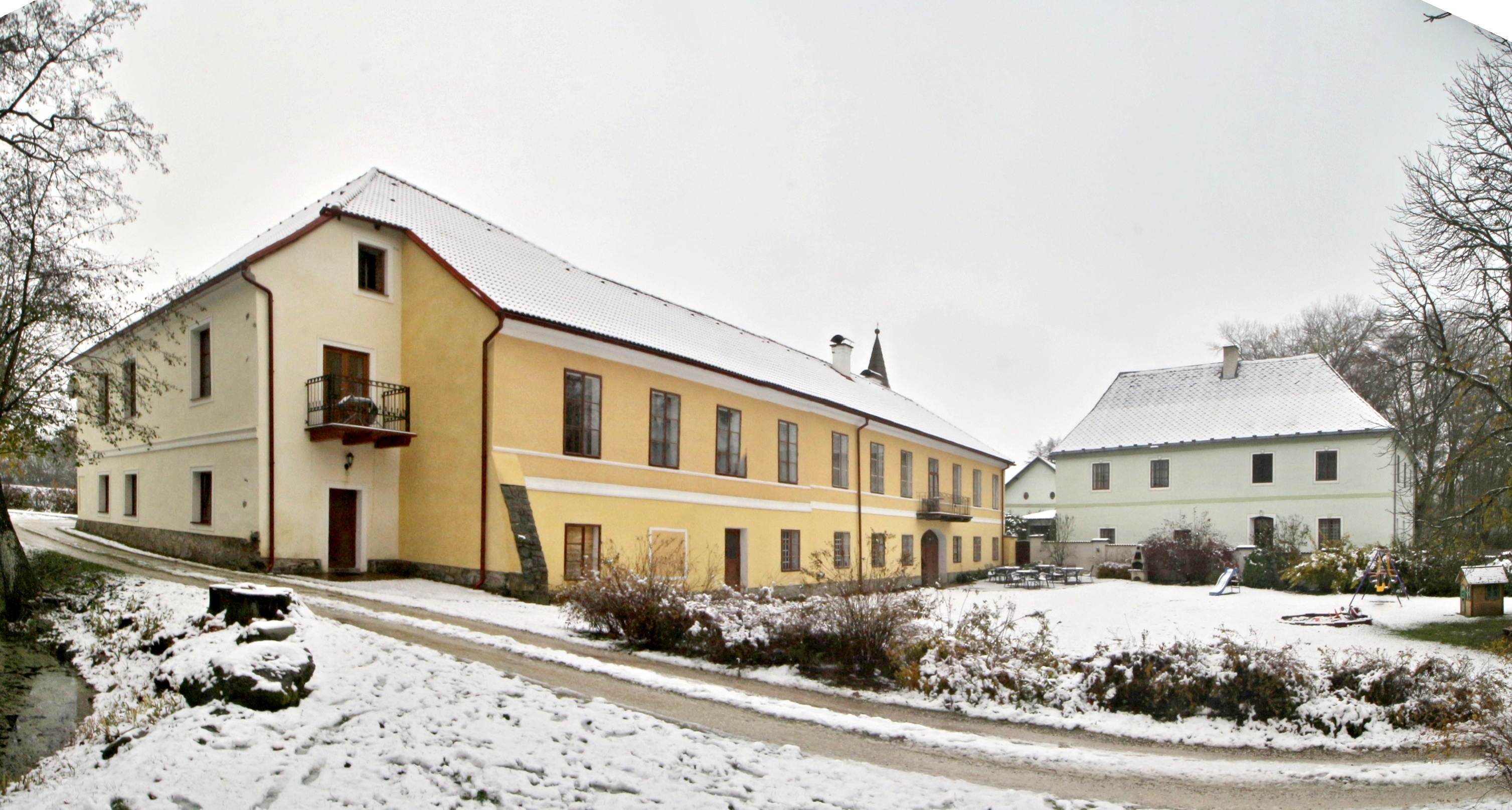 Jindřichovický zámek